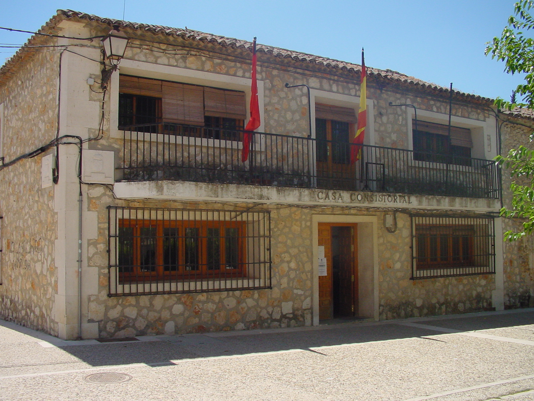 Ayuntamiento de Nuevo Baztán.